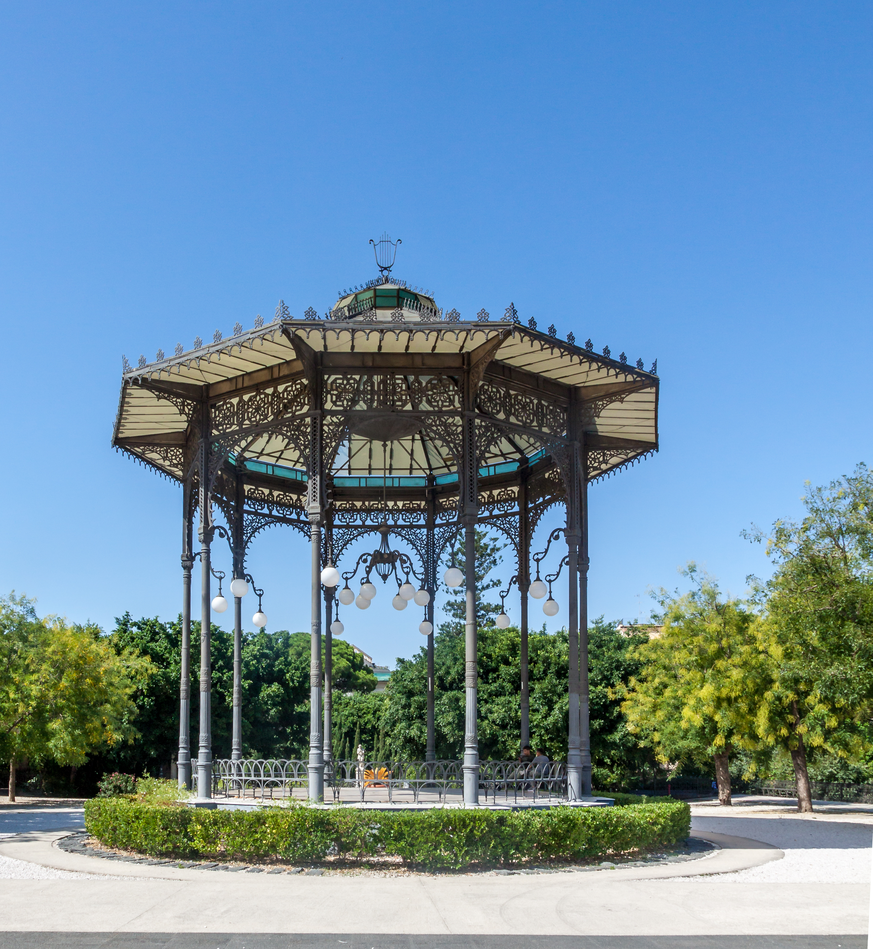 Villa Bellini (Catania) - Pavillion